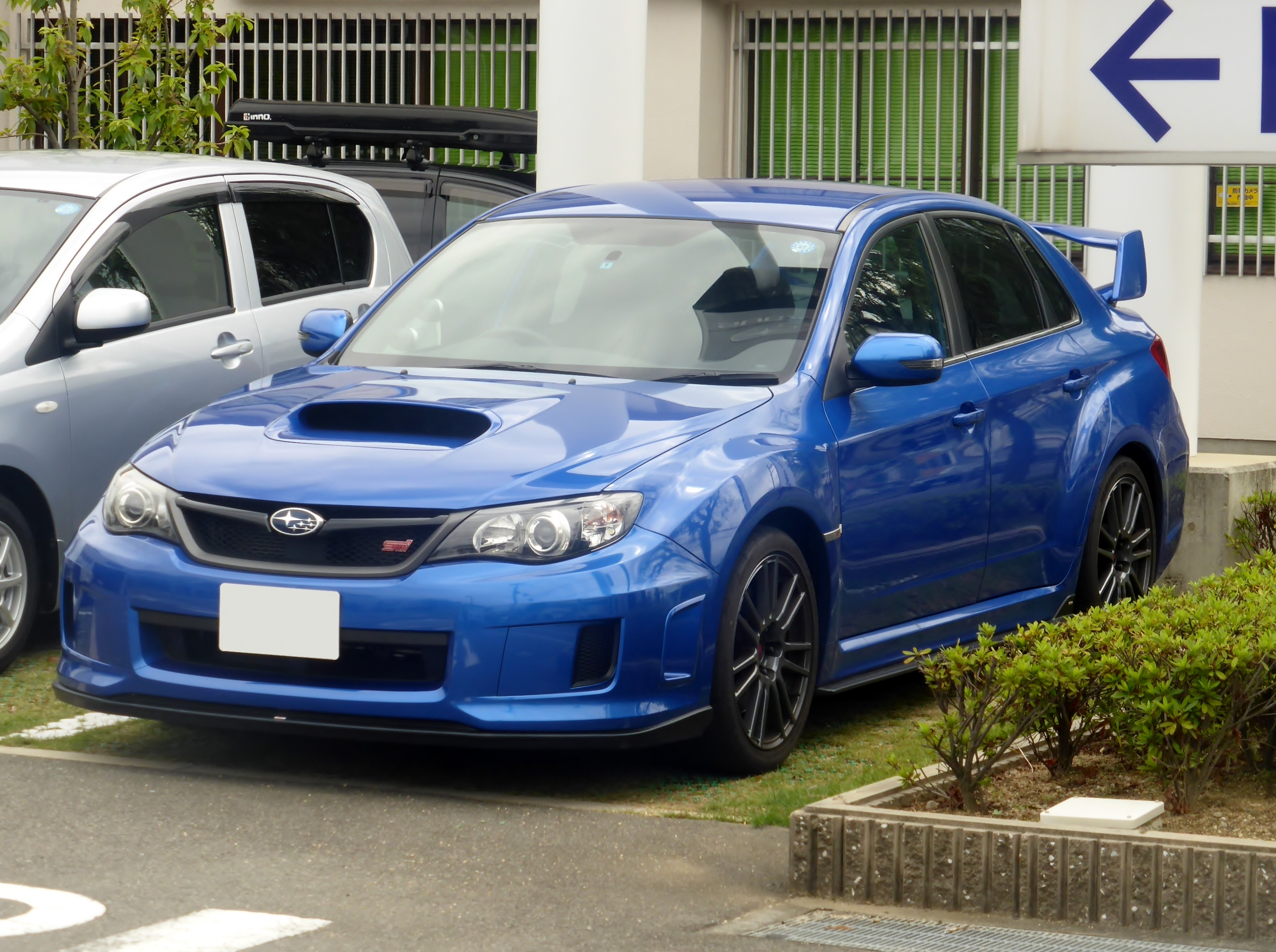 GVB型スバル・WRX STIスペックCをフロントから撮影。